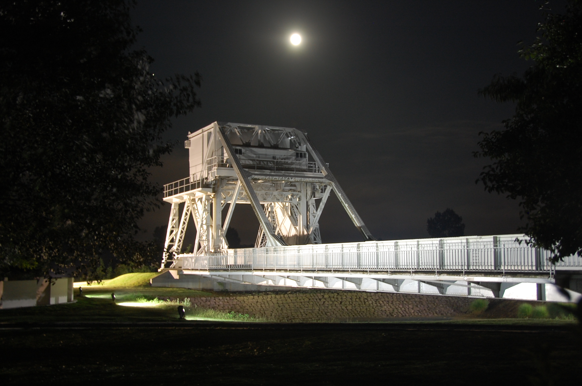 De originele Pegasus-brug in het museum wordt 's nachts keurig verlicht.